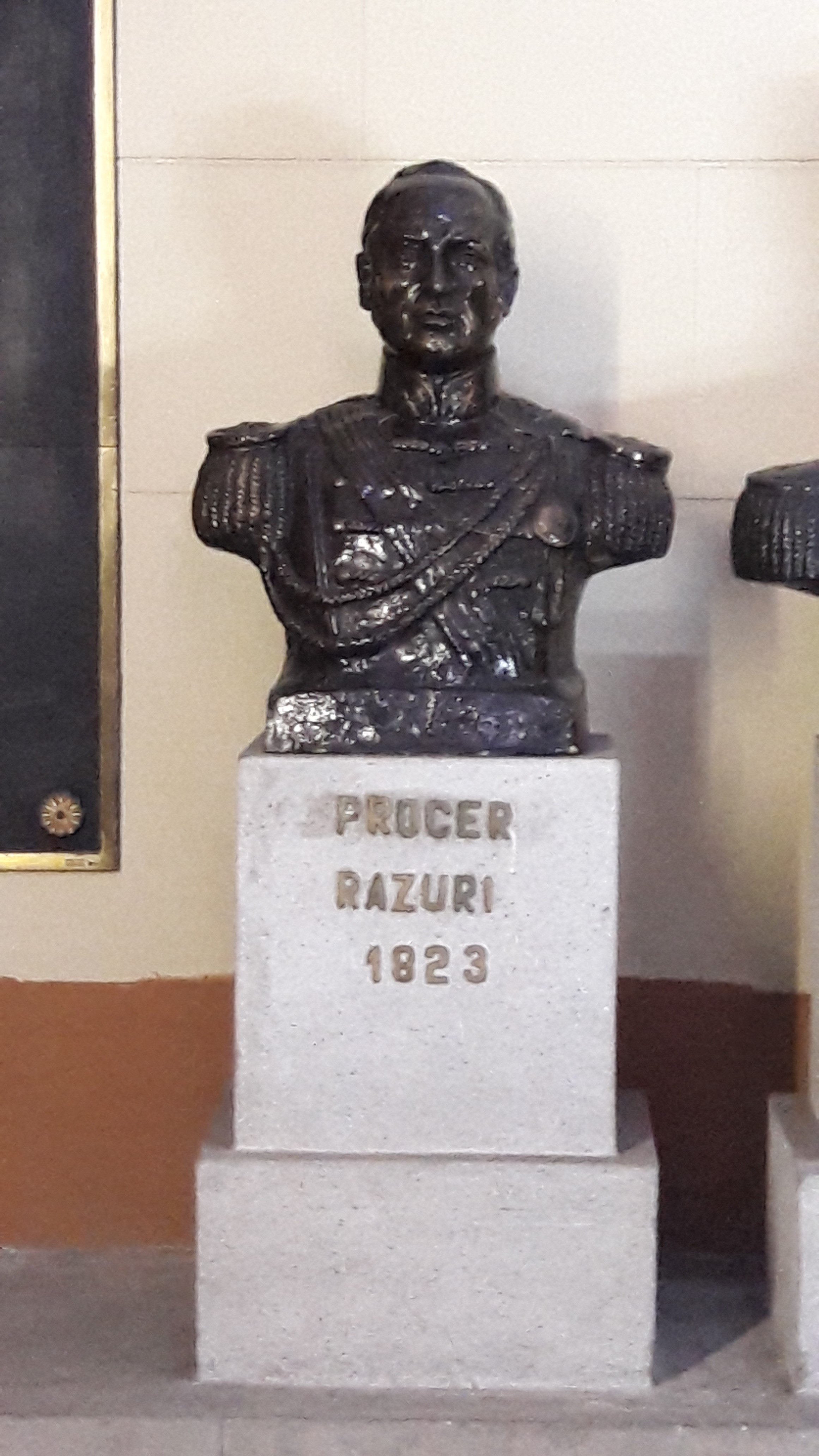 Prócer Razuri 1823